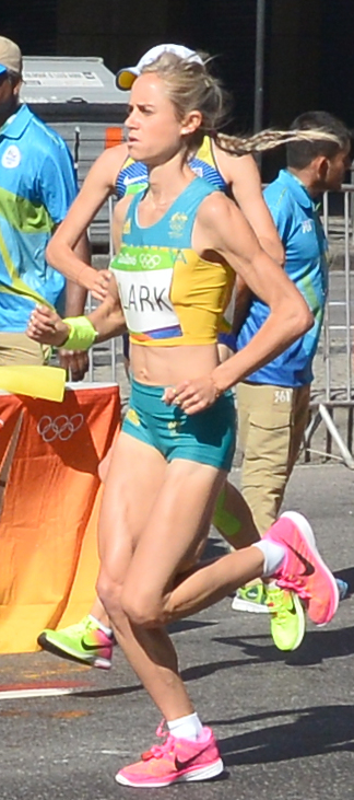 Passage du marathon des jeux olympiques de Rio 2016 dans le centre de Rio